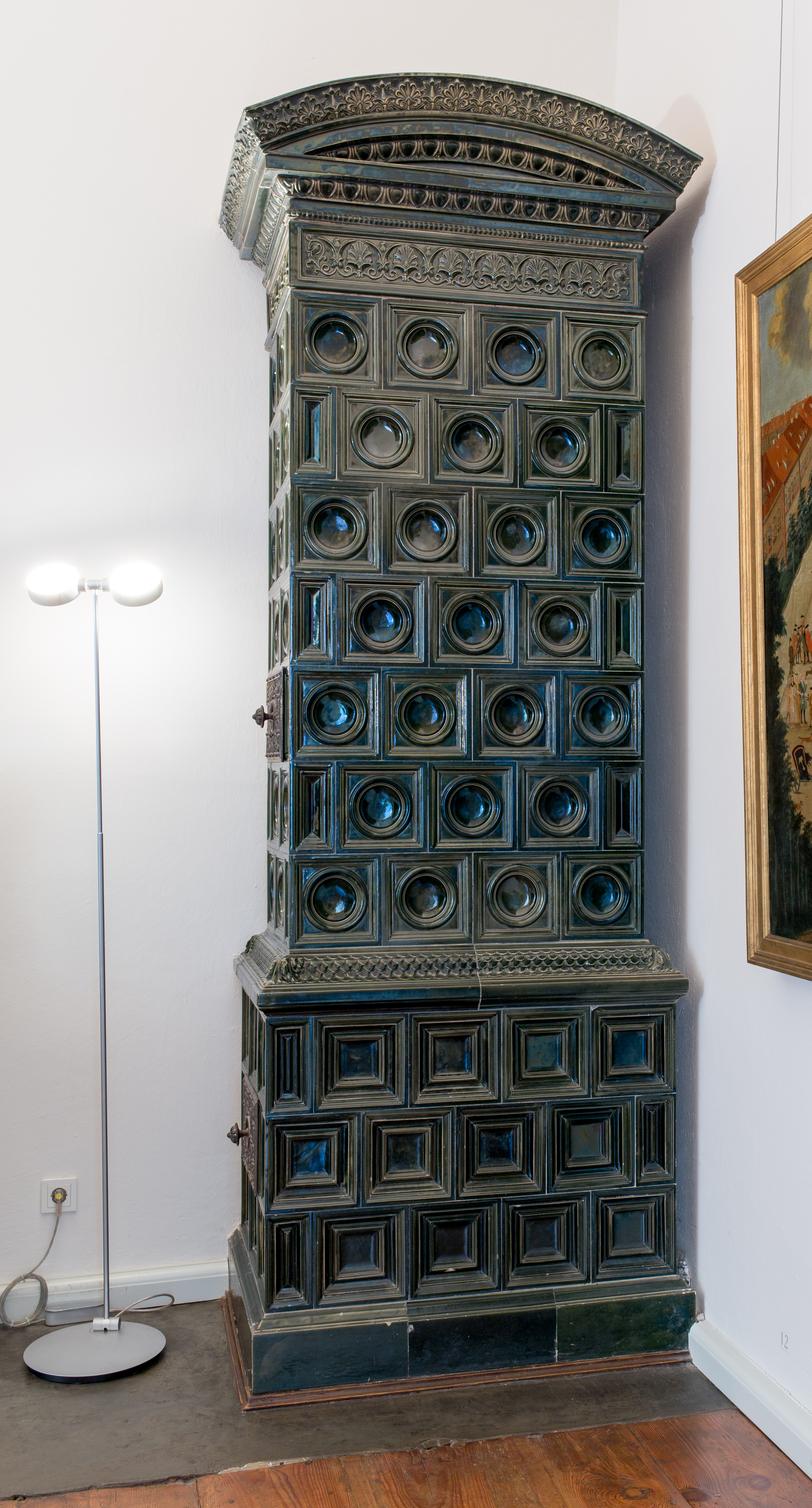 Kachelofen. um 1903 Die östlichen Räume wurden seit dem 17. Jahrhundert als Wohnung für höhere Hofbeamte genutzt. Im 18. und 19. Jahrhundert hatte hier der Hofjägermeister seinen Wohnsitz. Erst Kaiser Wilhelm II. ließ das Schloss 1903 bis 1909 zu ausschließlich herrschaftlicher Nutzung umbauen.